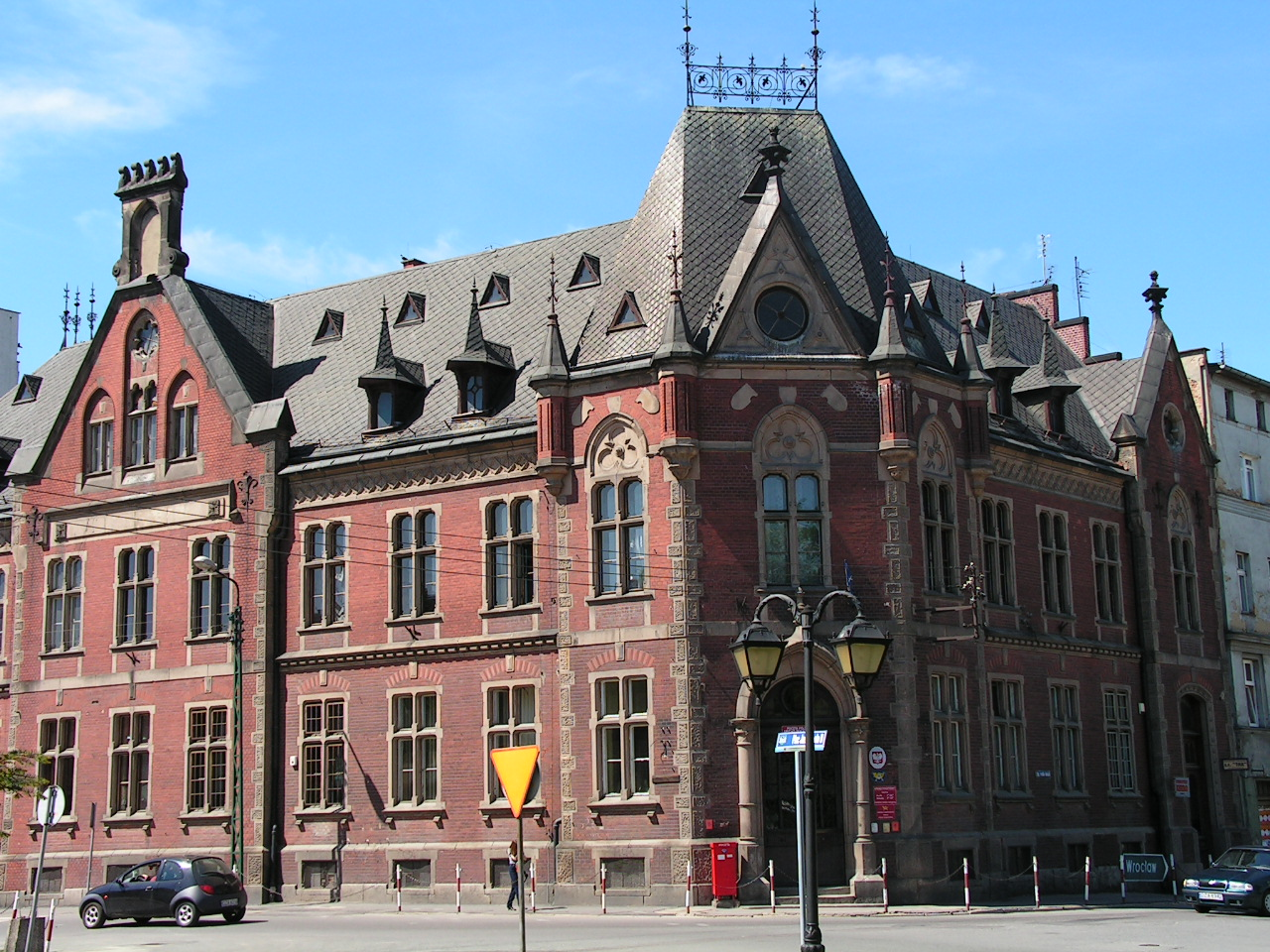 Ząbkowice Śląskie, ul. 1 Maja 1 - budynek Poczty Głównej (Autor zdjęcia: Andrzej Berdowicz)